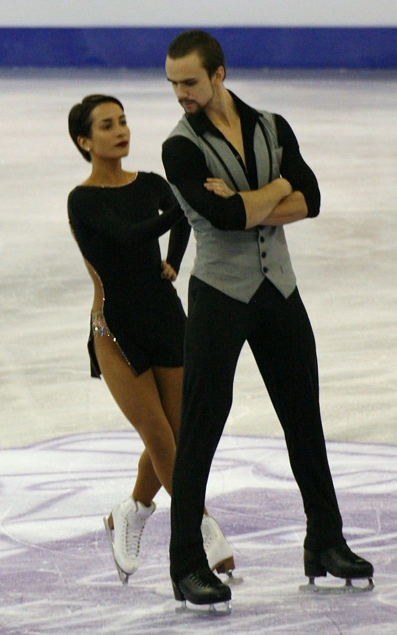 Ксения Столбова и Федор Климов (Россия) на финале Гран-при по фигурному катанию 2015-2016.